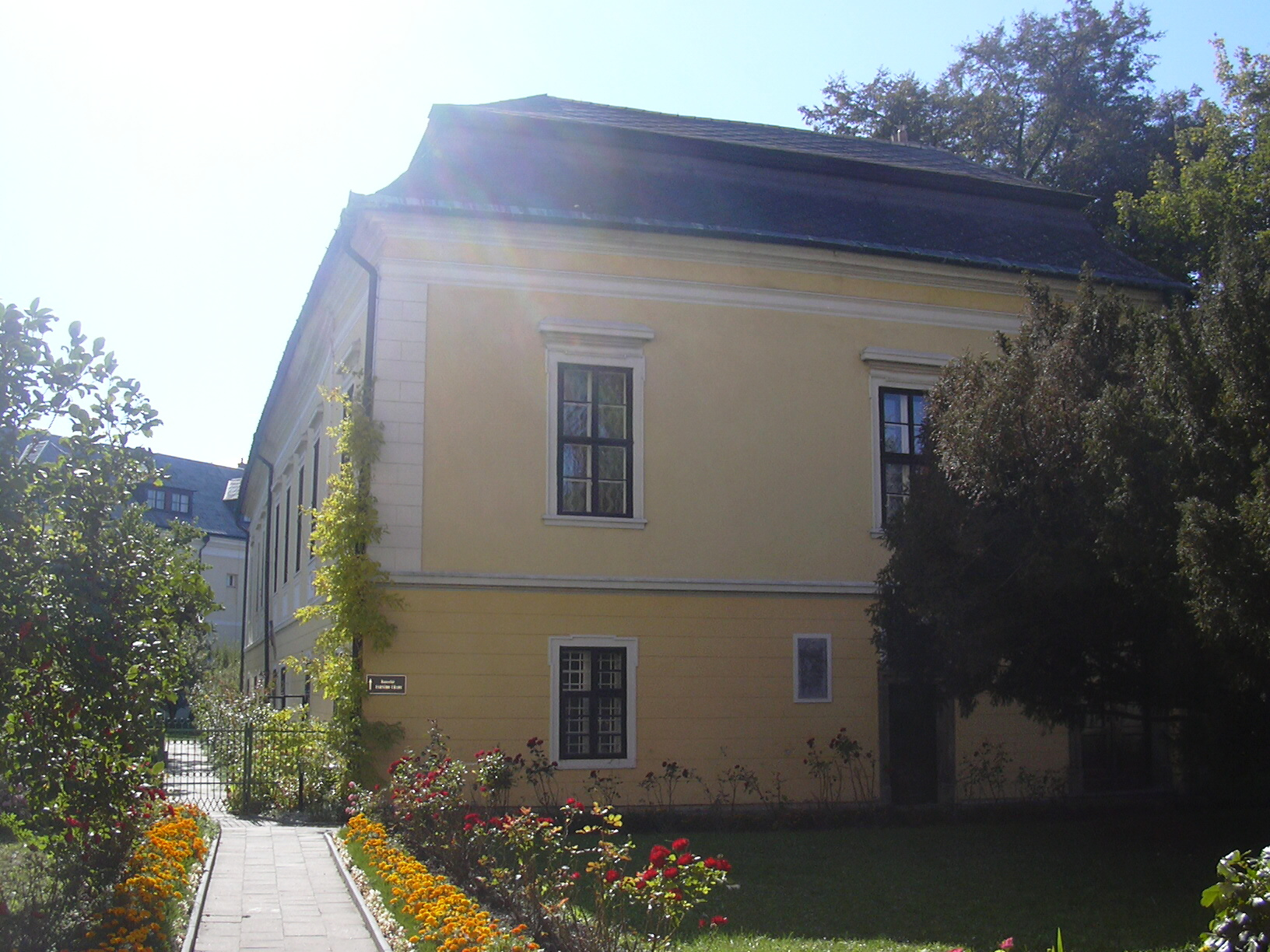 Proboštství v Kroměříži